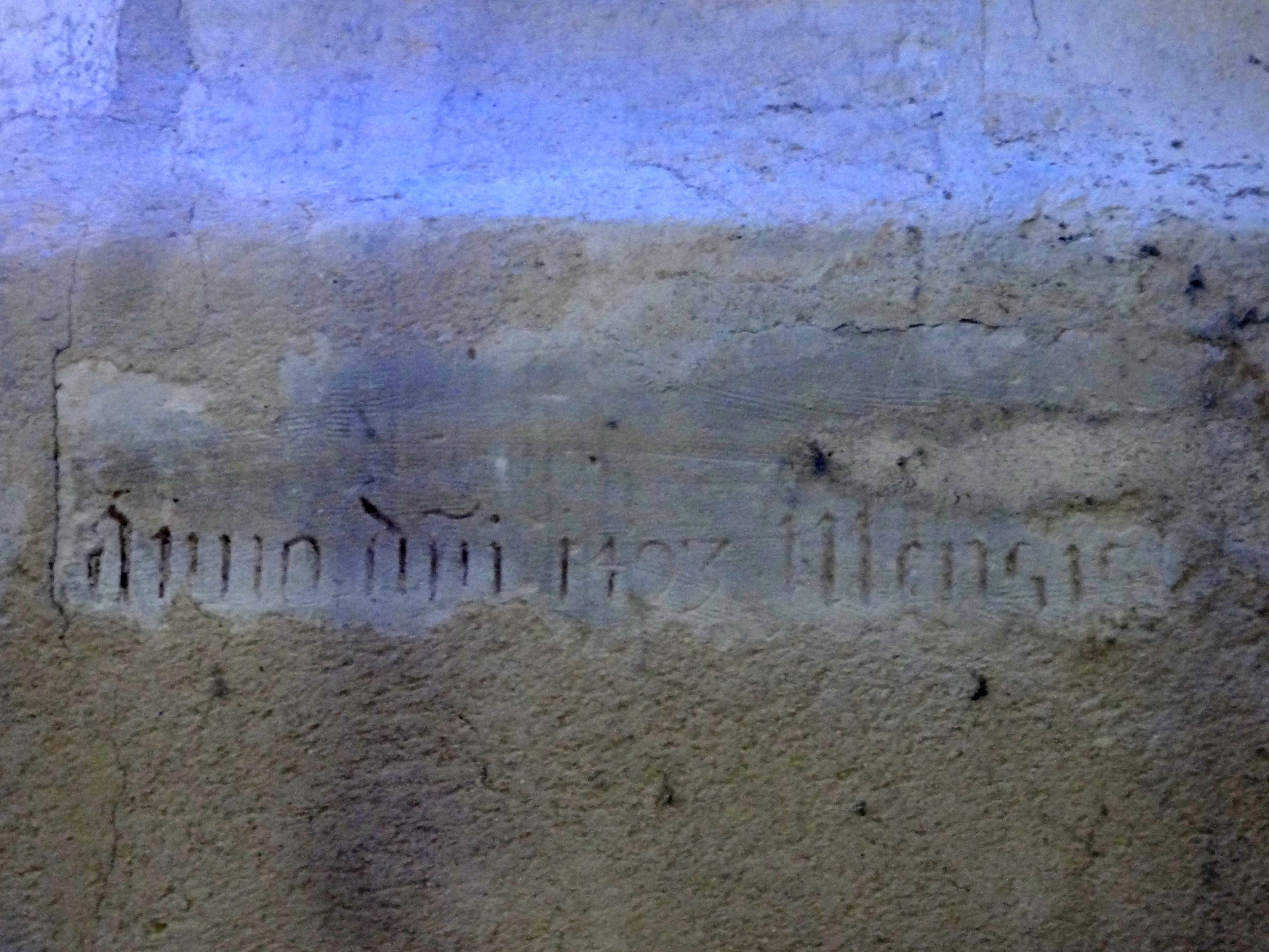 Abside, inscription de dédicace derrière l'autel, partie droite (partie médiane illisible).